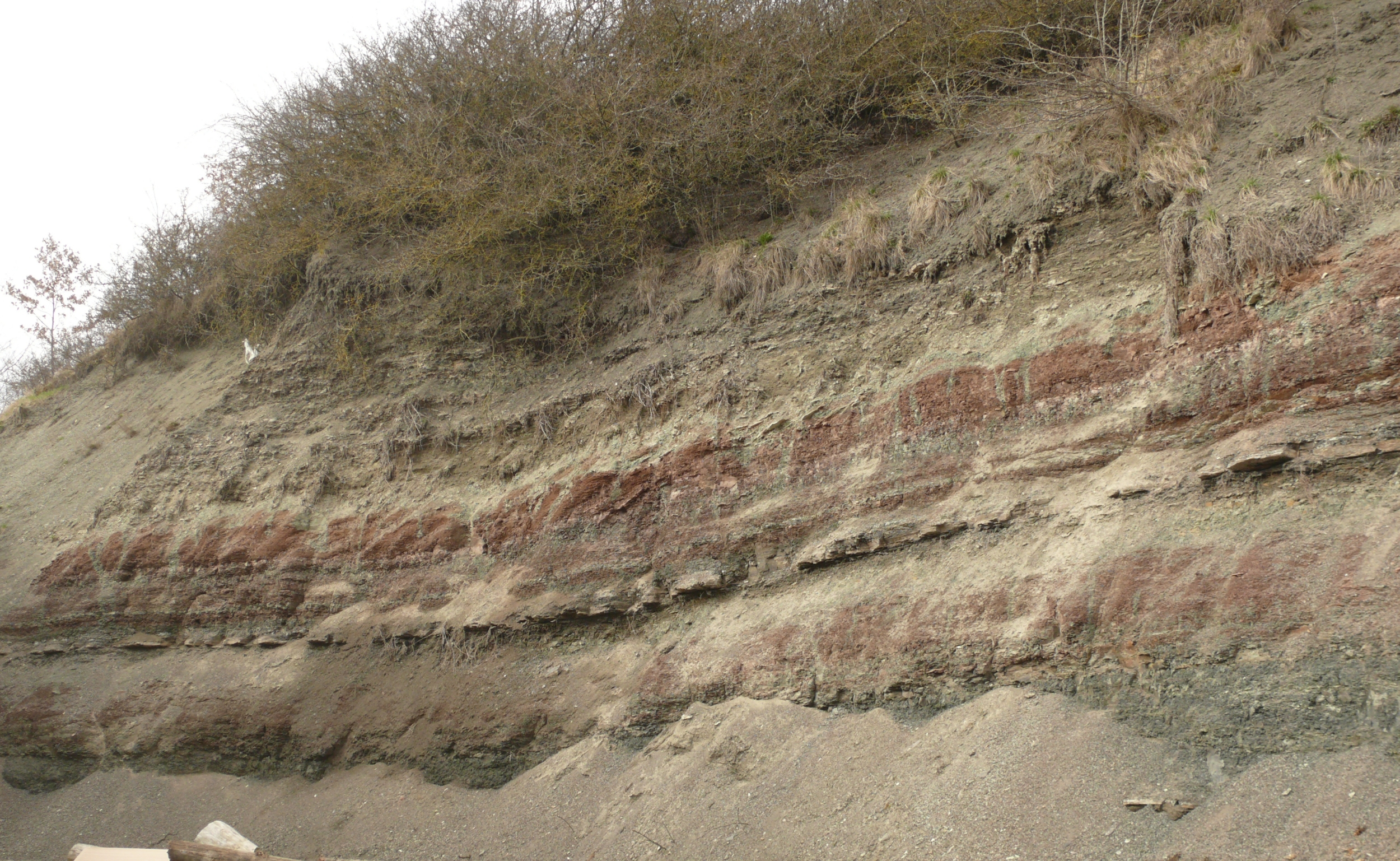 Untere Bunte Estherienschichten und Graue Estherienschichten, Grabfeld-Formation, KeuperWegböschung in Frankenhardt